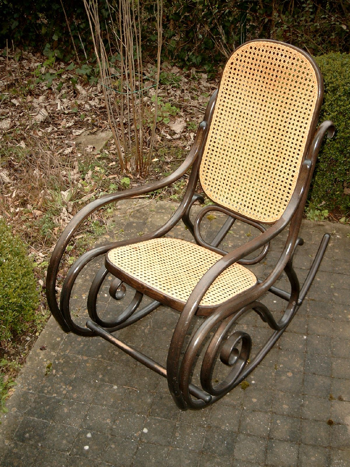 Schommelstoel van Michaël Thonet (1860)